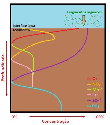 Oxidação da matéria orgânica